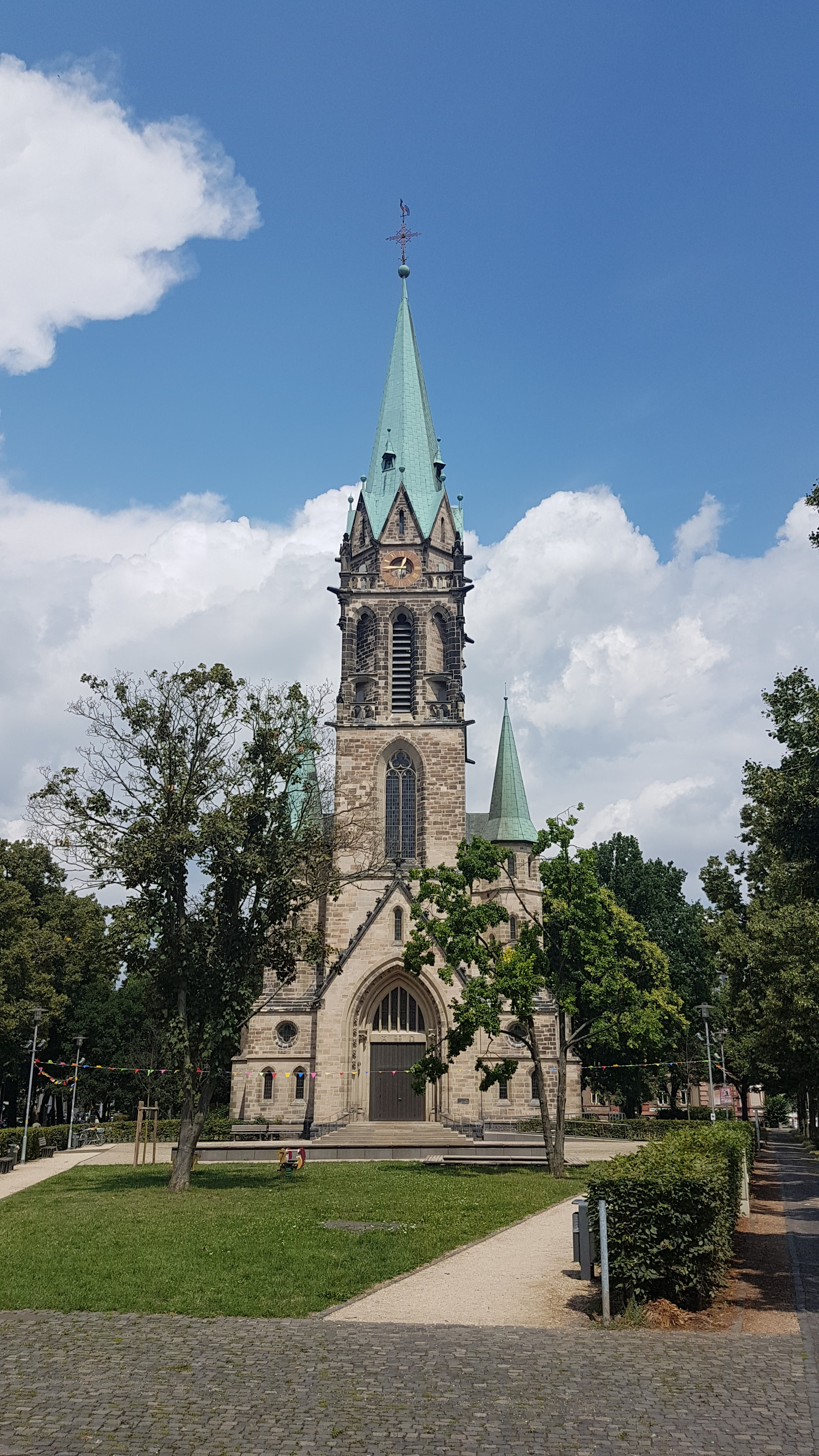 Die evangelische Johanneskirche im Johannesviertel Darmstadt, dessen Name von dem der Kirche abgeleitet ist.